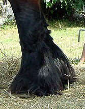 Fanons d'un étalon de race ardennaise